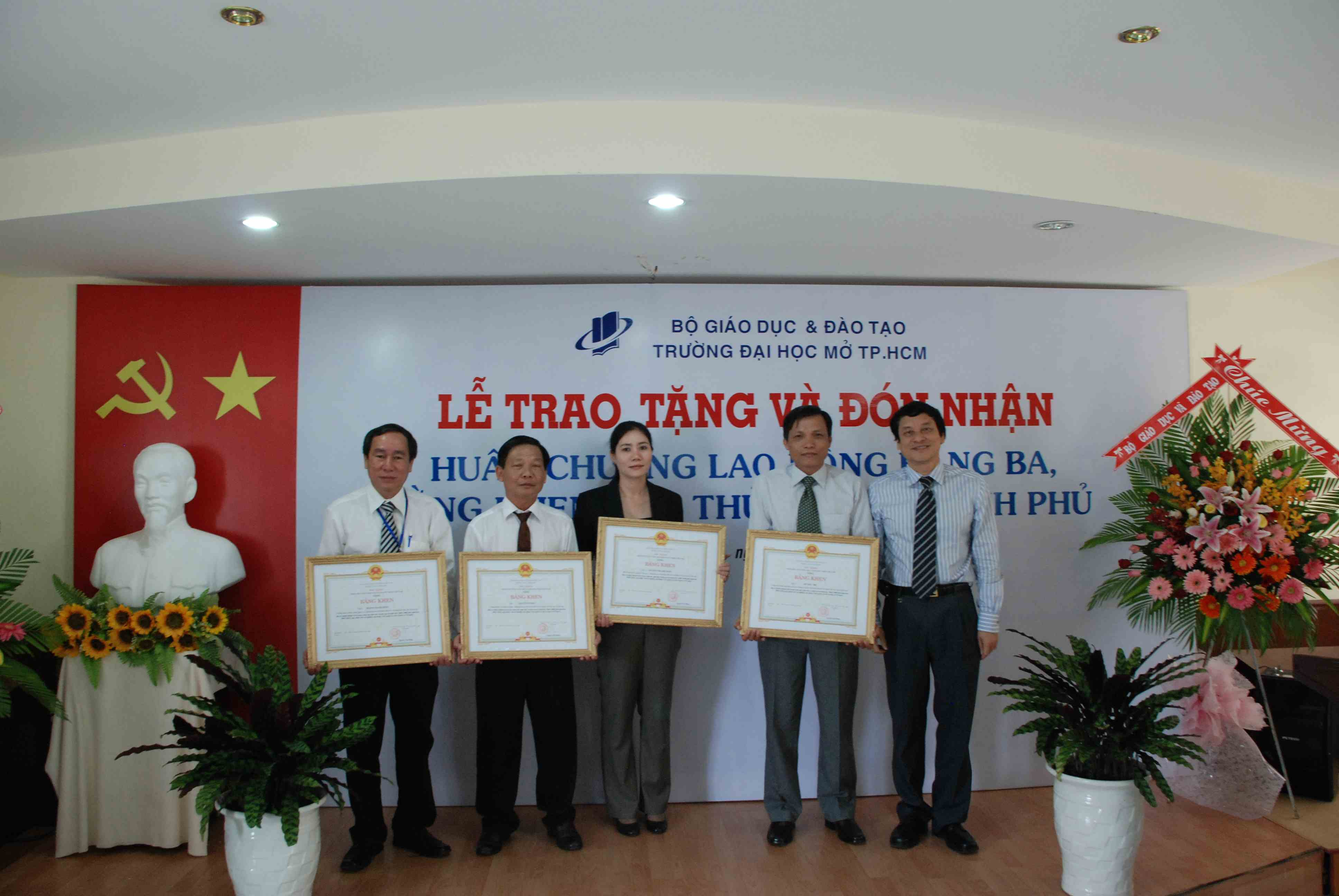 Huân chương Lao động hạng ba